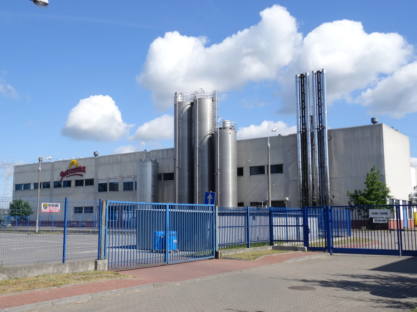 Zakład Jutrzenka-Colian przy ul. Srebrnej 22 w Bydgoszczy (Osowa Góra)